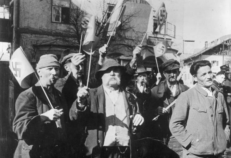 This description has been identified as biased or incorrect: Original Nazi-propaganda descriptionDie deutschen Bauern von Tirol mit Hakenkreuzfahnen. Den deutschen Soldaten boten sich beim Einzug in Innsbruck unvergessliche Eindrücke eines begeisterten Volkes. Überall zeigte es sich, dass auch die deutschen Bauern Tirols zu den treuesten Söhnen des deutschen Volkes zählen. UBz: Tiroler Bauern mit Hakenkreuzfahnen, mit denen sie den einziehenden deutschen Soldaten in jubelnder Freude zuwinkten.